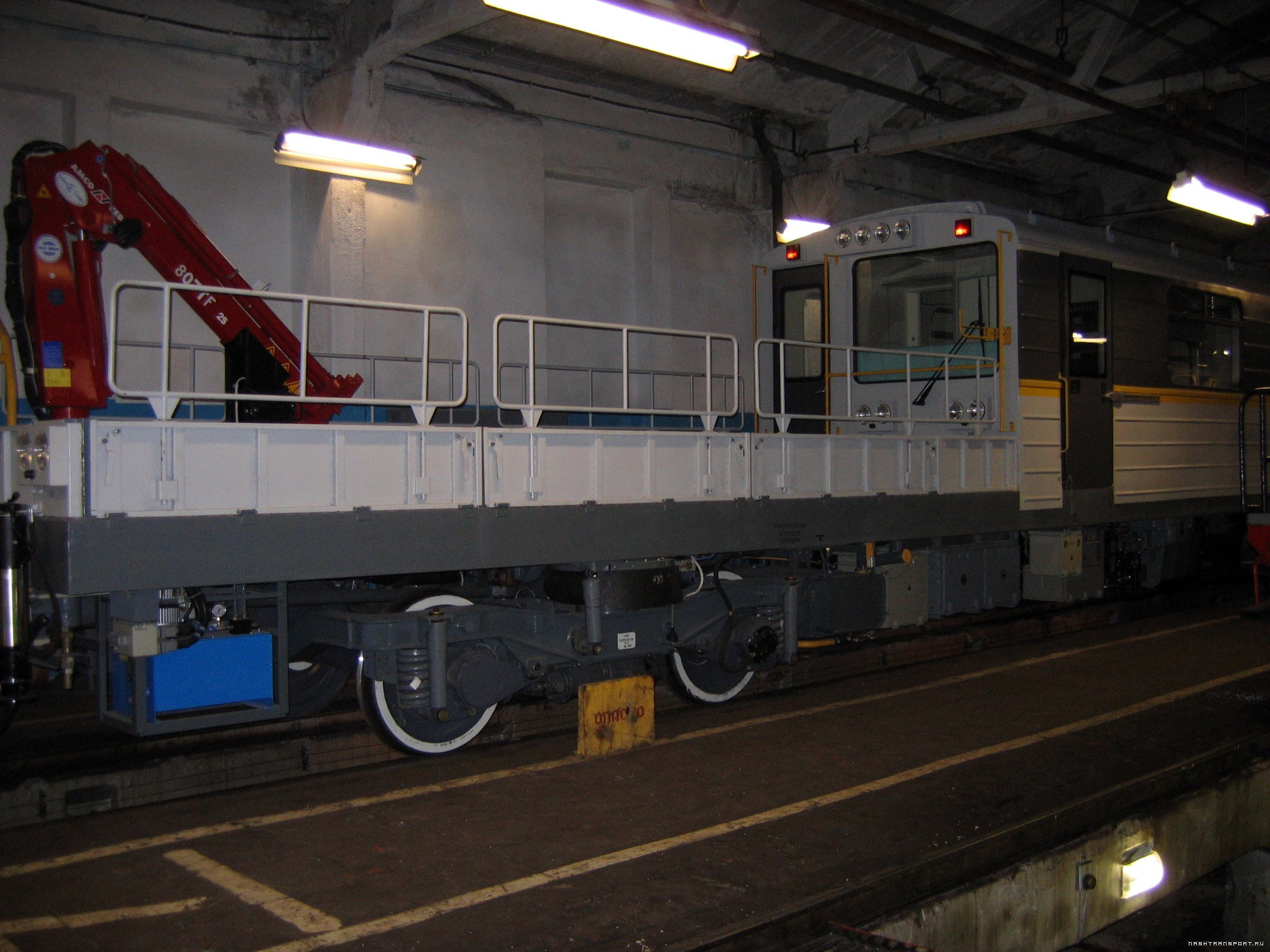 Грузопассажирская автомотриса с краном модели 81-730.05. Построена в 2008 году для линии Д6 (метро-2)